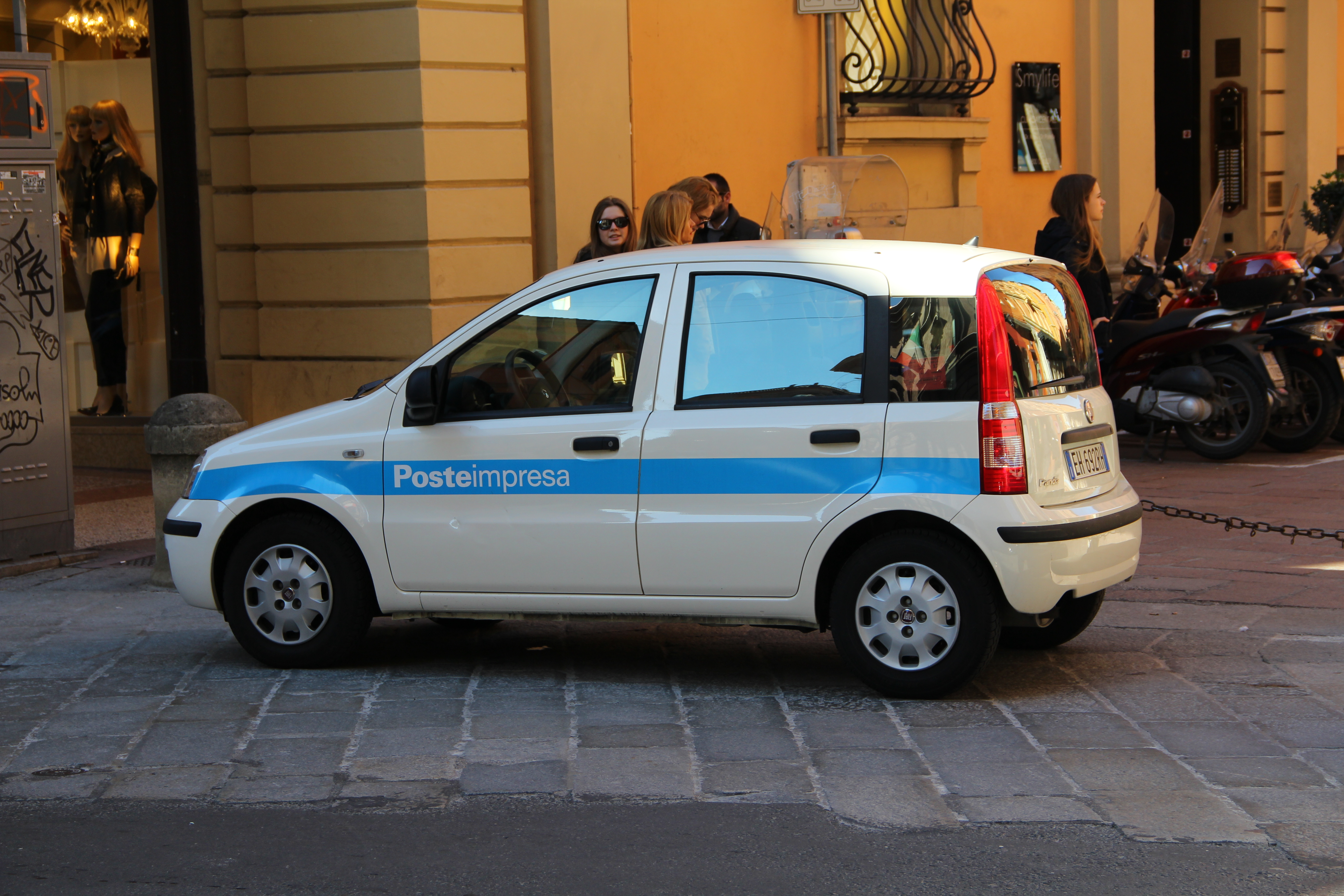 Fahrzeug in Bologna